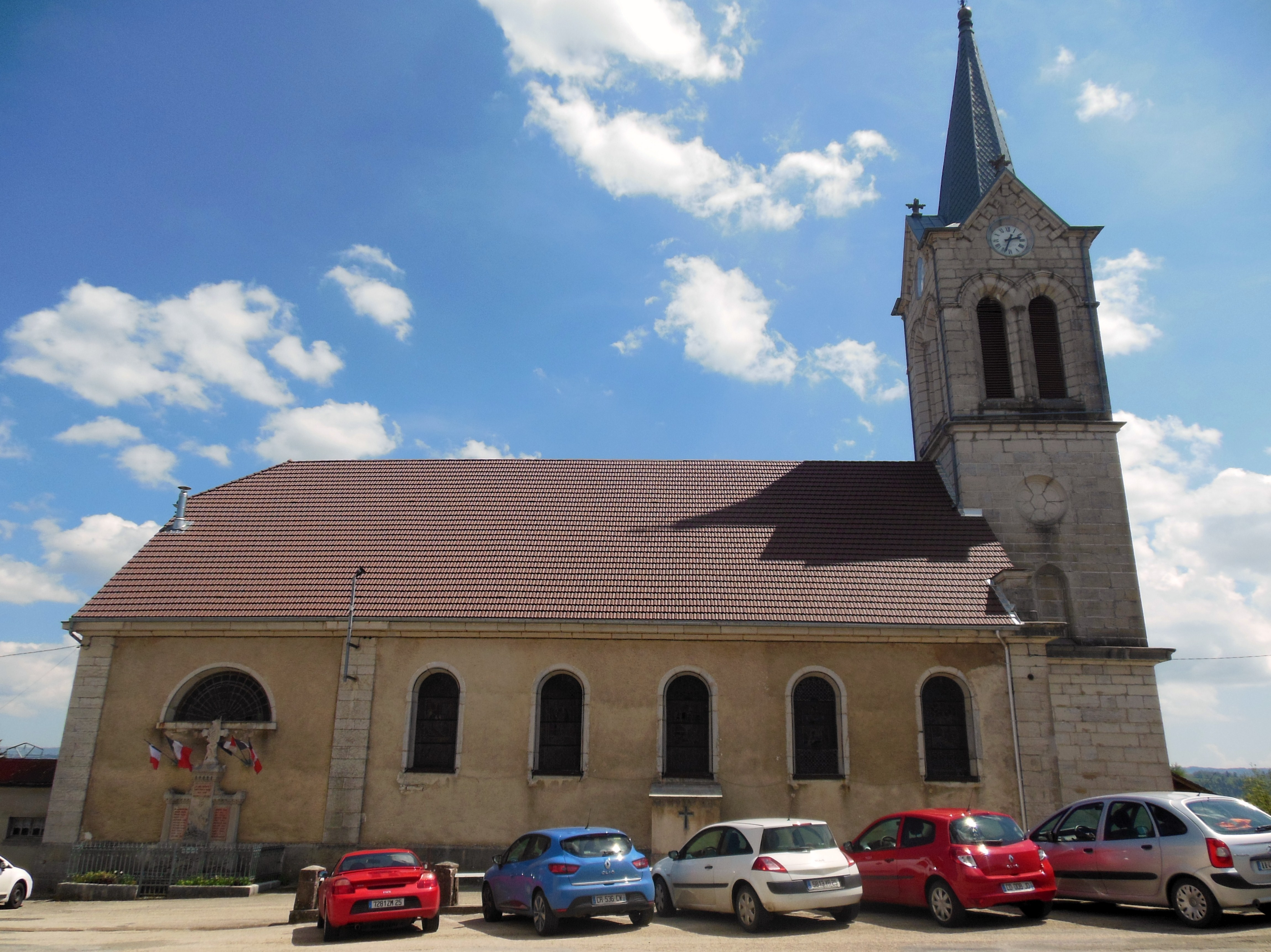 Église Notre-Dame-des-Victoires (XIXe s), Place François-Xavier Joubert, à Fournet-Blancheroche.